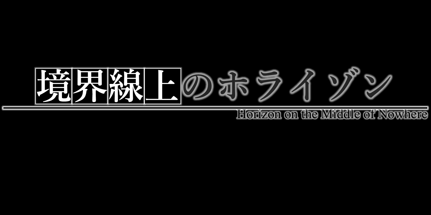 Logo de la serie de manga, Kyōkai Senjō no Horizon.